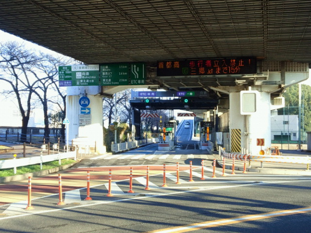 首都高速道路6号向島線向島入口（堀切ＪＣＴ方面側入口一般道との接続部を撮影）